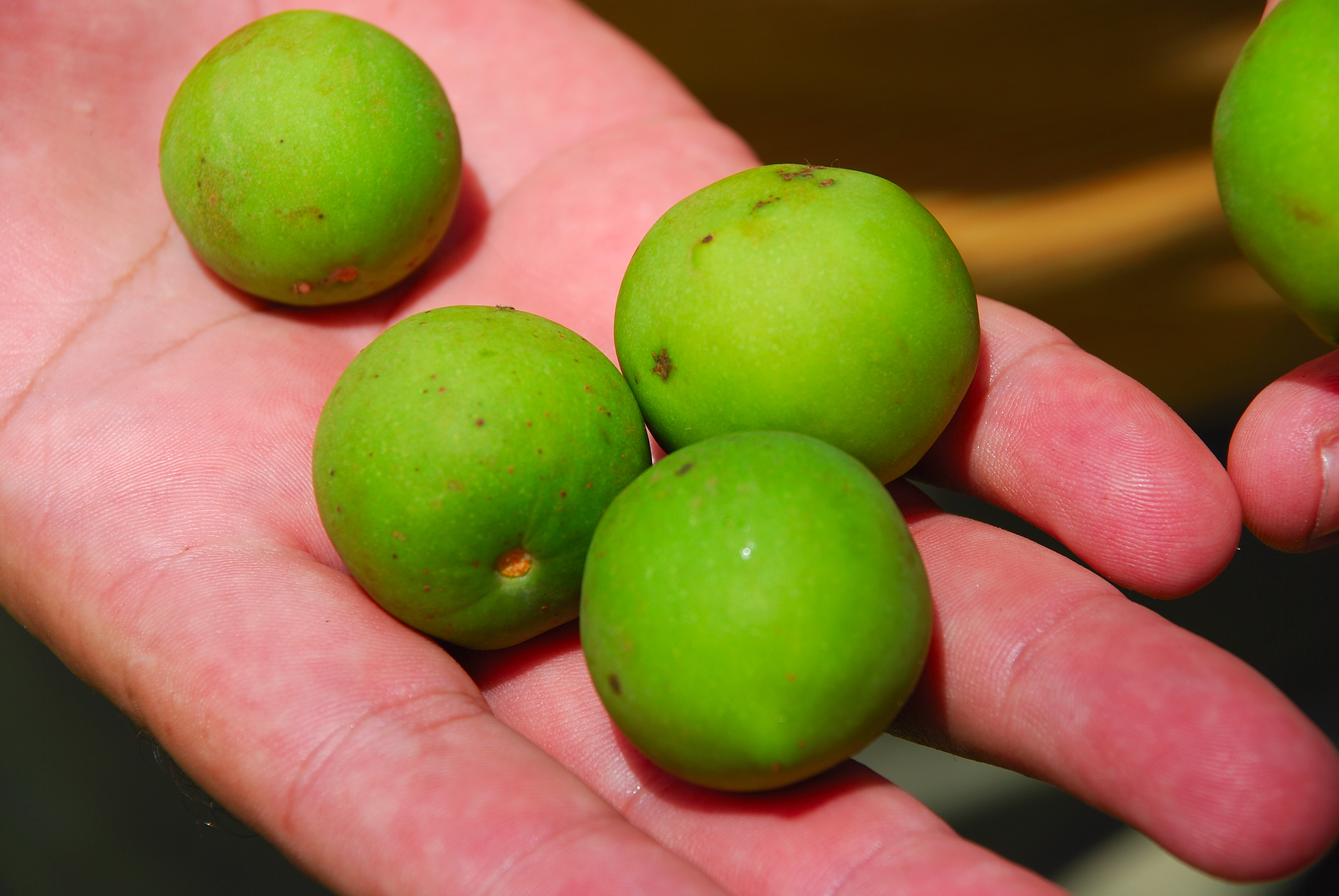 frutos de guanandi